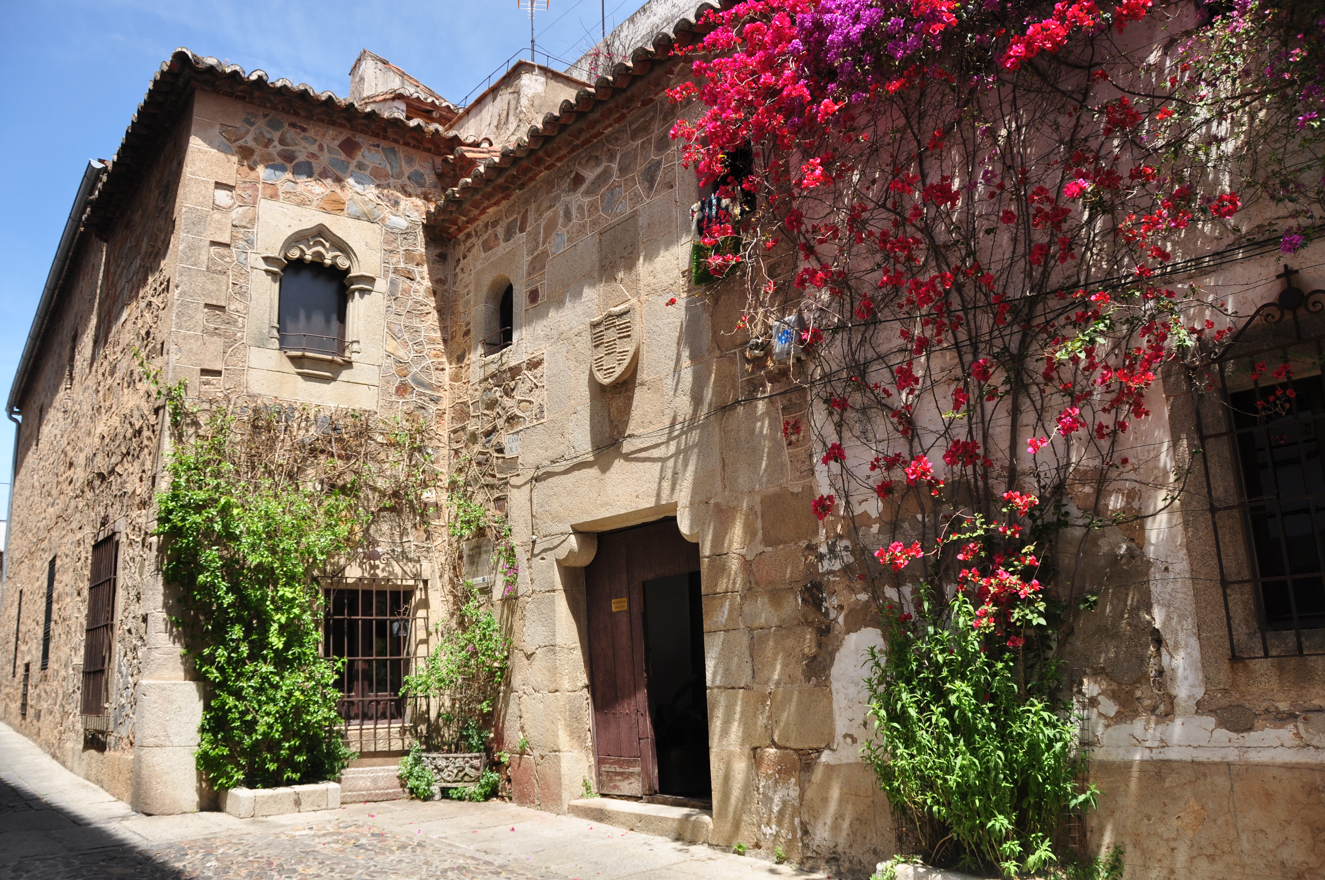 Hospital de los Caballeros en la Ciudad Monumental de Cáceres.